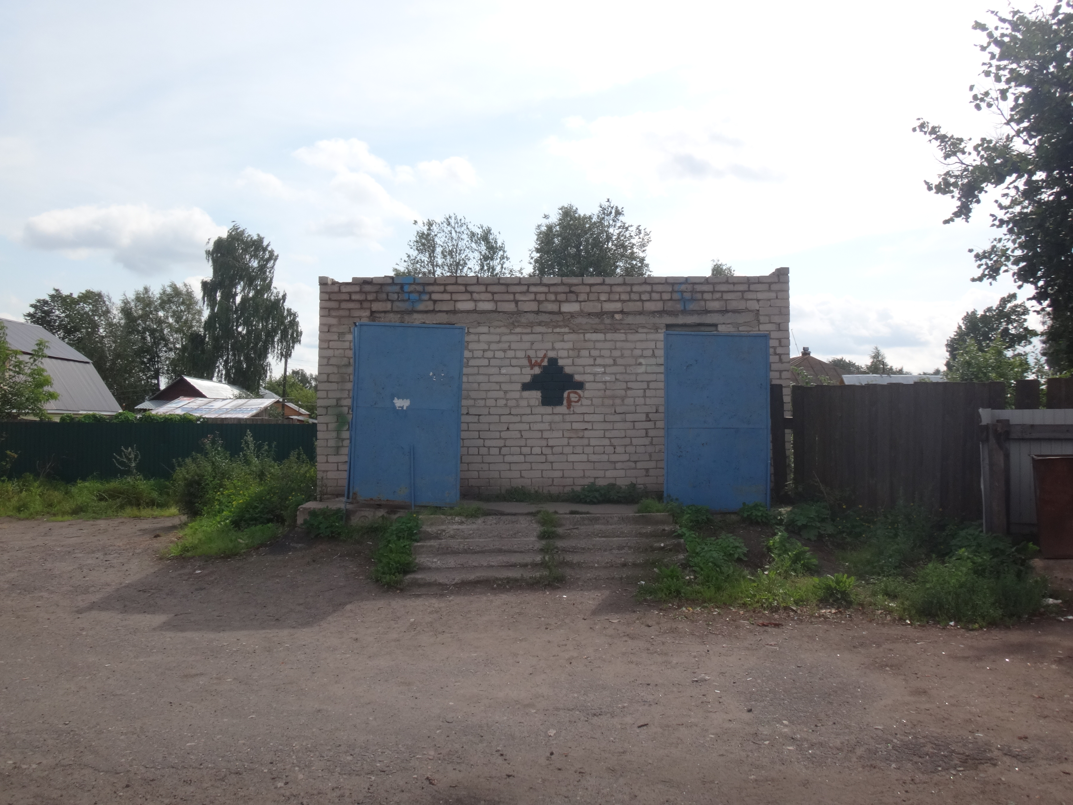 Сортир на автостанции Устюжны